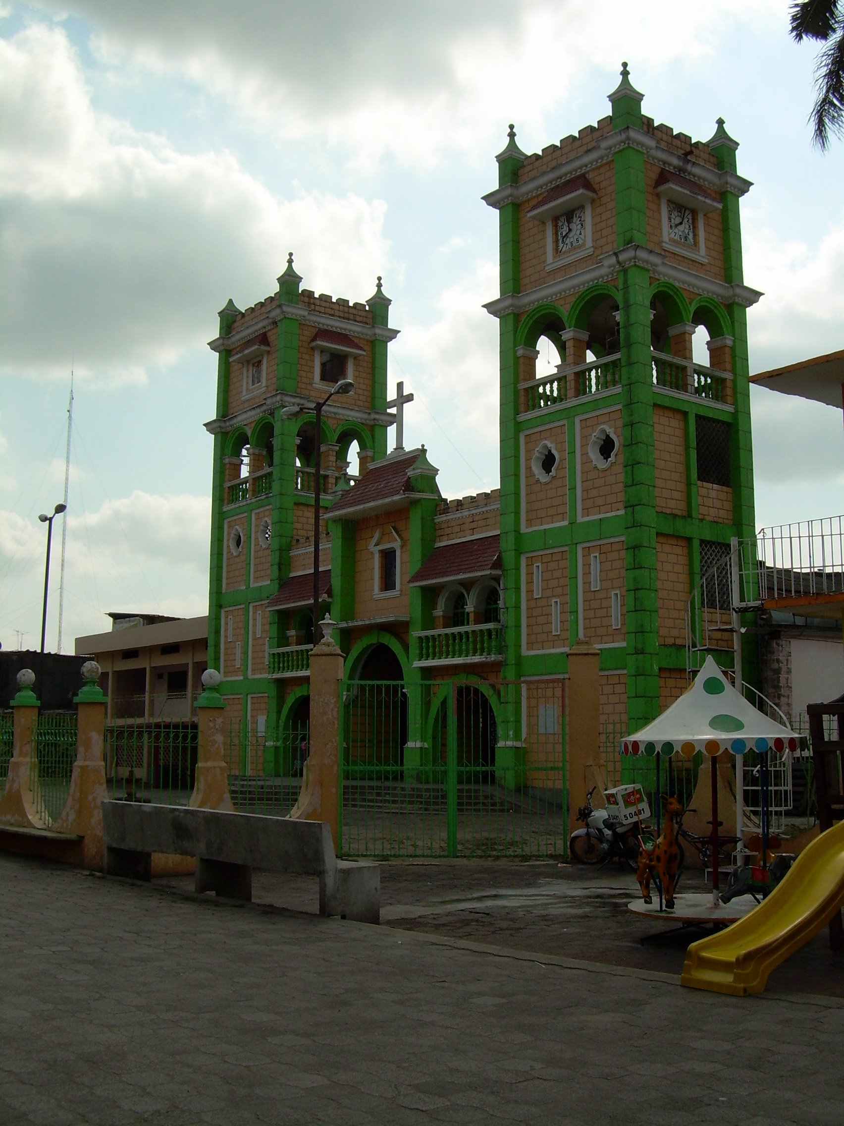 Facha de la iglesia principal de Tres Valles, Ver., parroquia Cristo Rey, ubicada a un costado del Palacio municipal, en las inmediaciones del zócalo de la ciudad (parque principal)